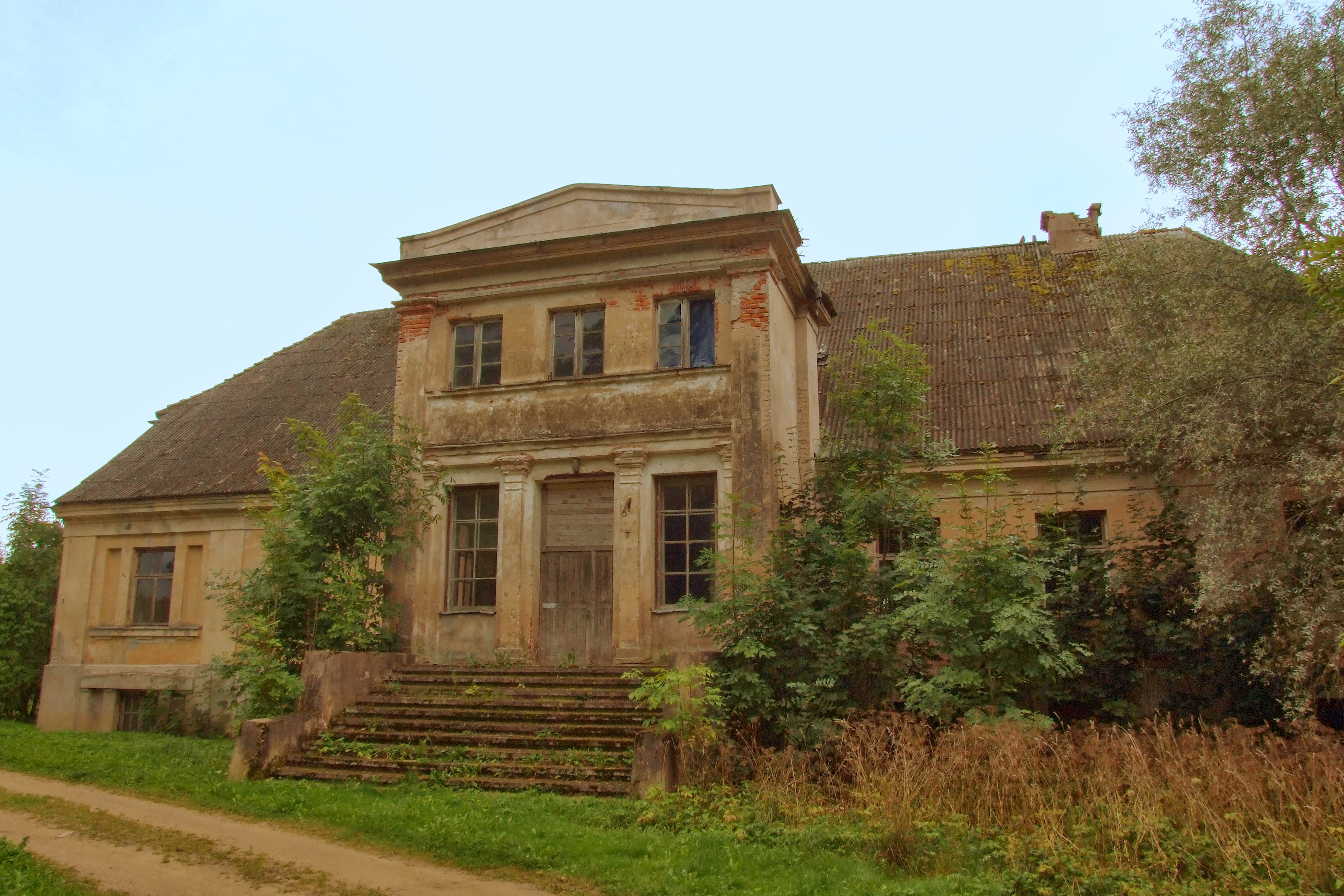 Oksle manor / Oksles muiža